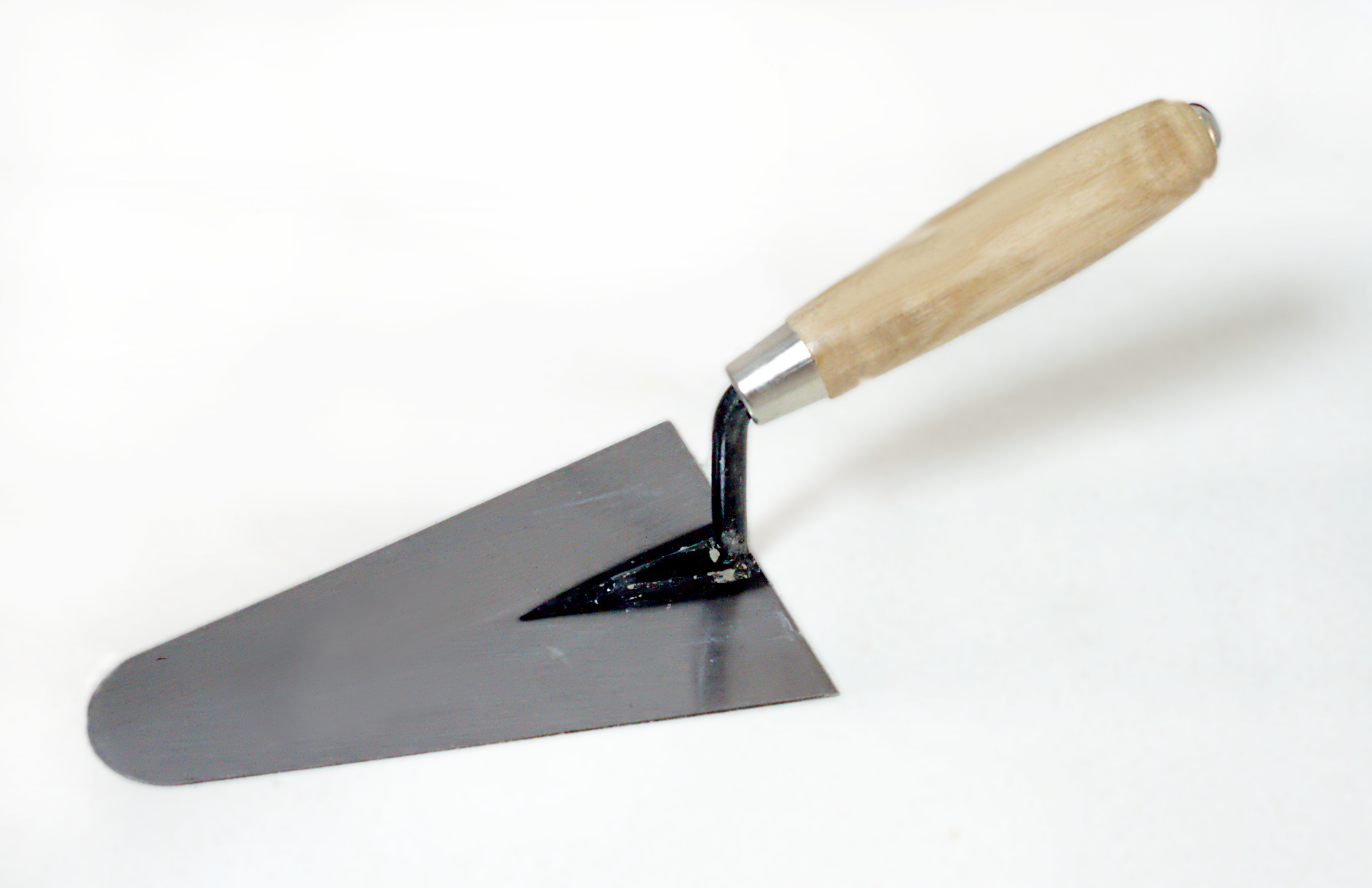 Truelle, outil pour la construction